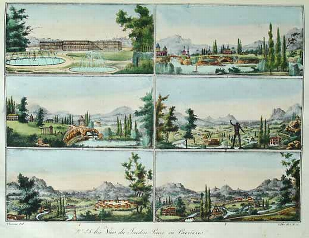 "Différentes vues de jardins", Illustration from "Plans raisonnés de toutes les espèces de jardins"